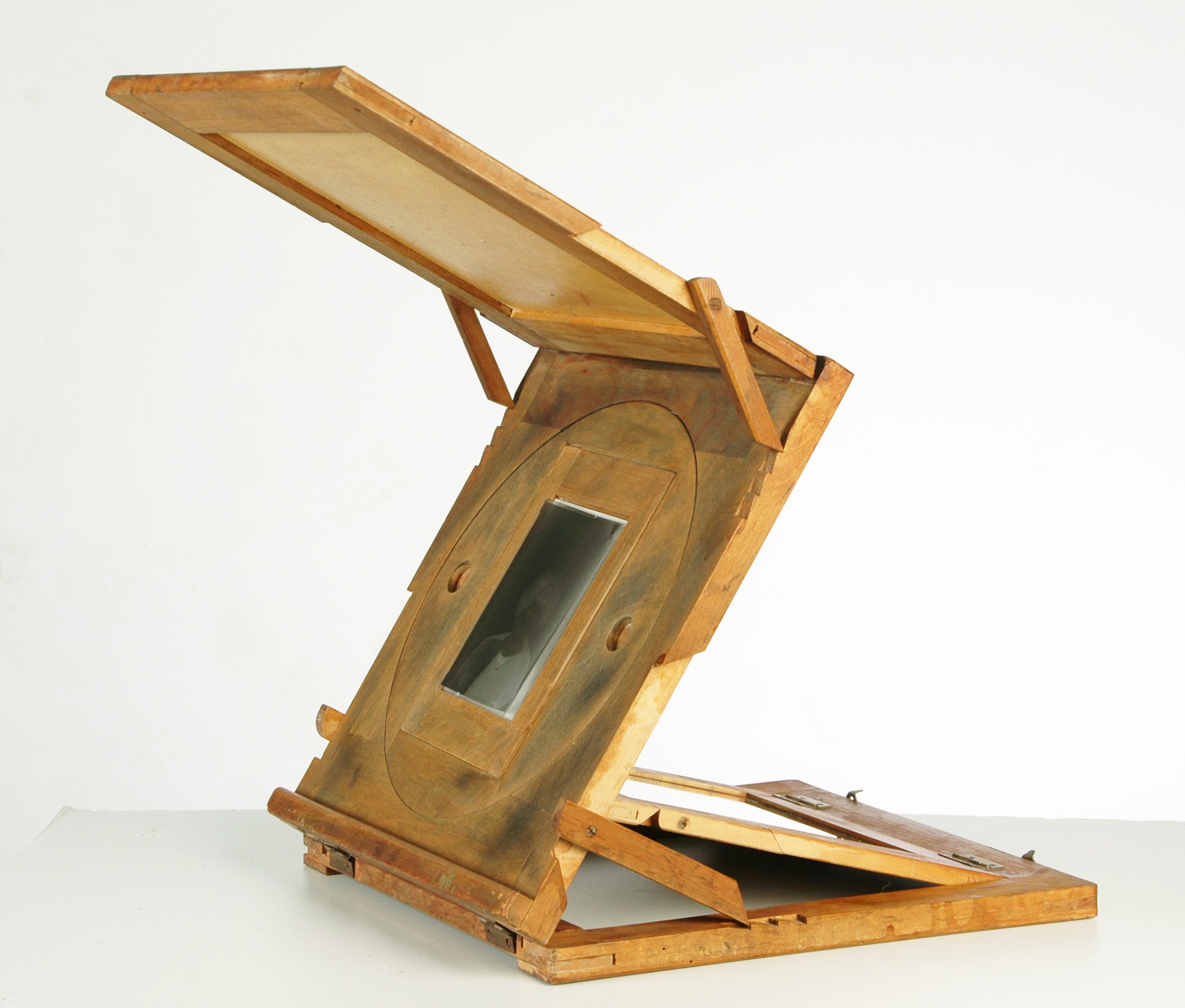 Retuschepult für analoge Fotografie Arbeitsgestell für die Retusche von großformatigen Negativen und Glasplatten (9 × 13 cm, 13 × 18 cm), im Gebrauch von ca. 1870–1950, durch kleine Winkel und Stützhölzchen ließ sich die Arbeitsfläche anpassen, in der Mitte ist eine Mattglasscheibe in einem Drehrahmen befestigt zur besseren Erreichbarkeit des zu retuschierenden Negativteils, Arbeitsposition mit Negativ auf der Glasscheibe